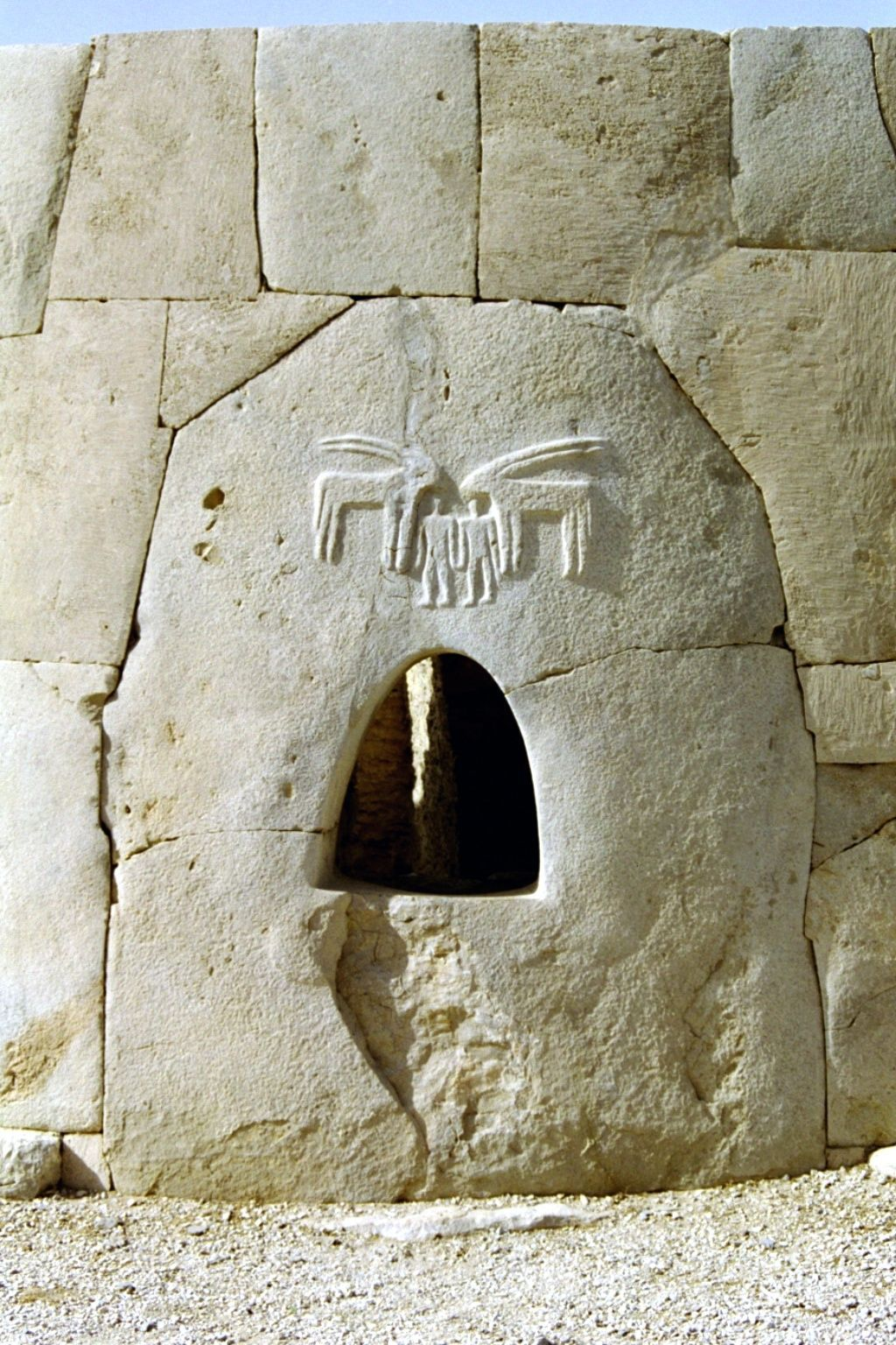 Rundgrab bei Al-Ain, ca. 3000 Jahre alt